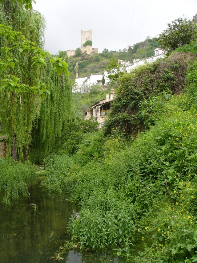 río Cerezuelo